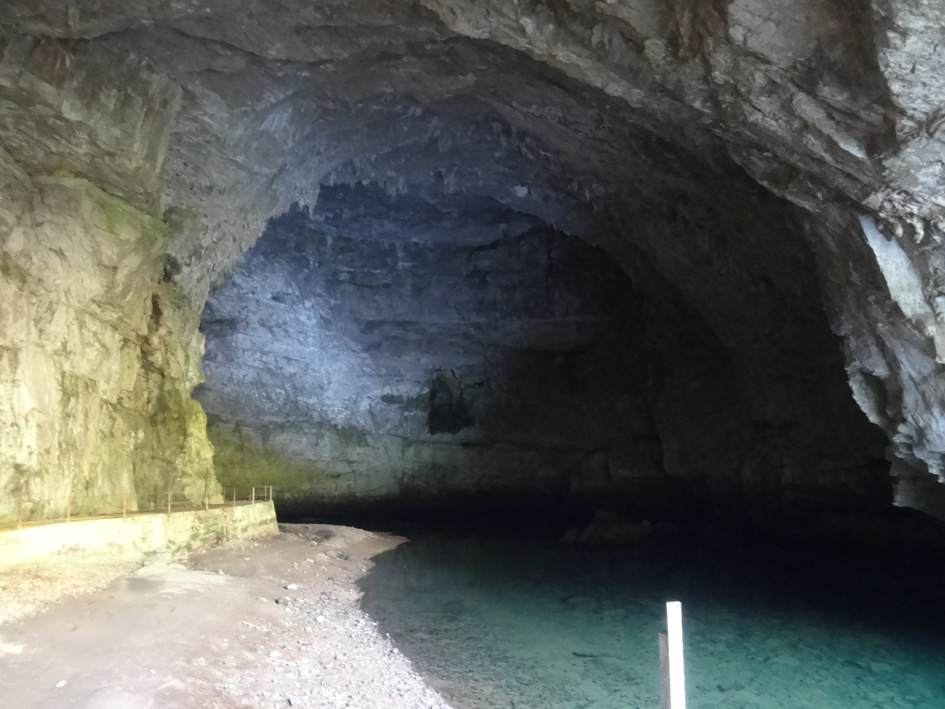 Planinska Jama, Eslovènia (agost 2013)